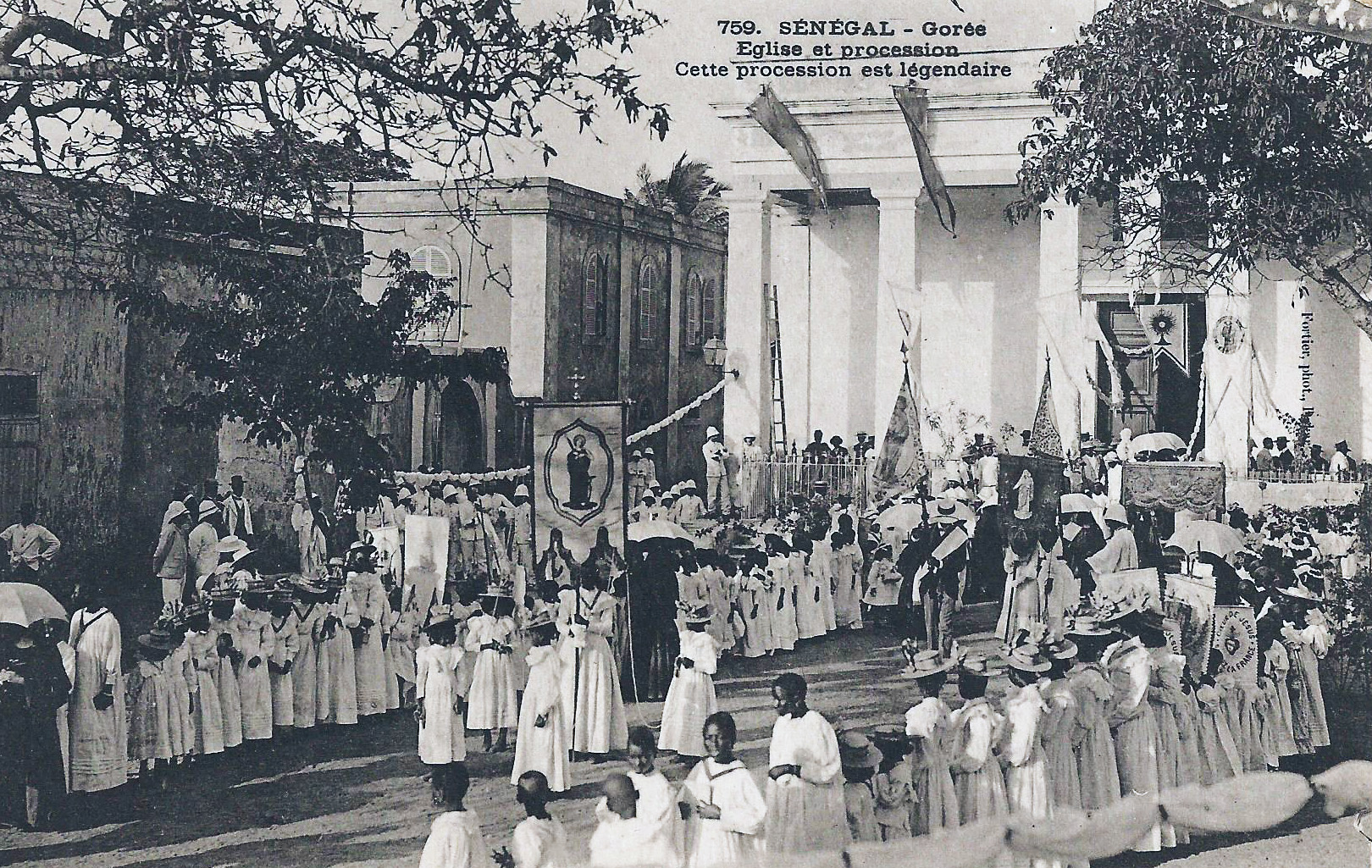 François-Edmond Fortier, Gorée. Eglise et procession. Afrique Occidentale - Sénégal.